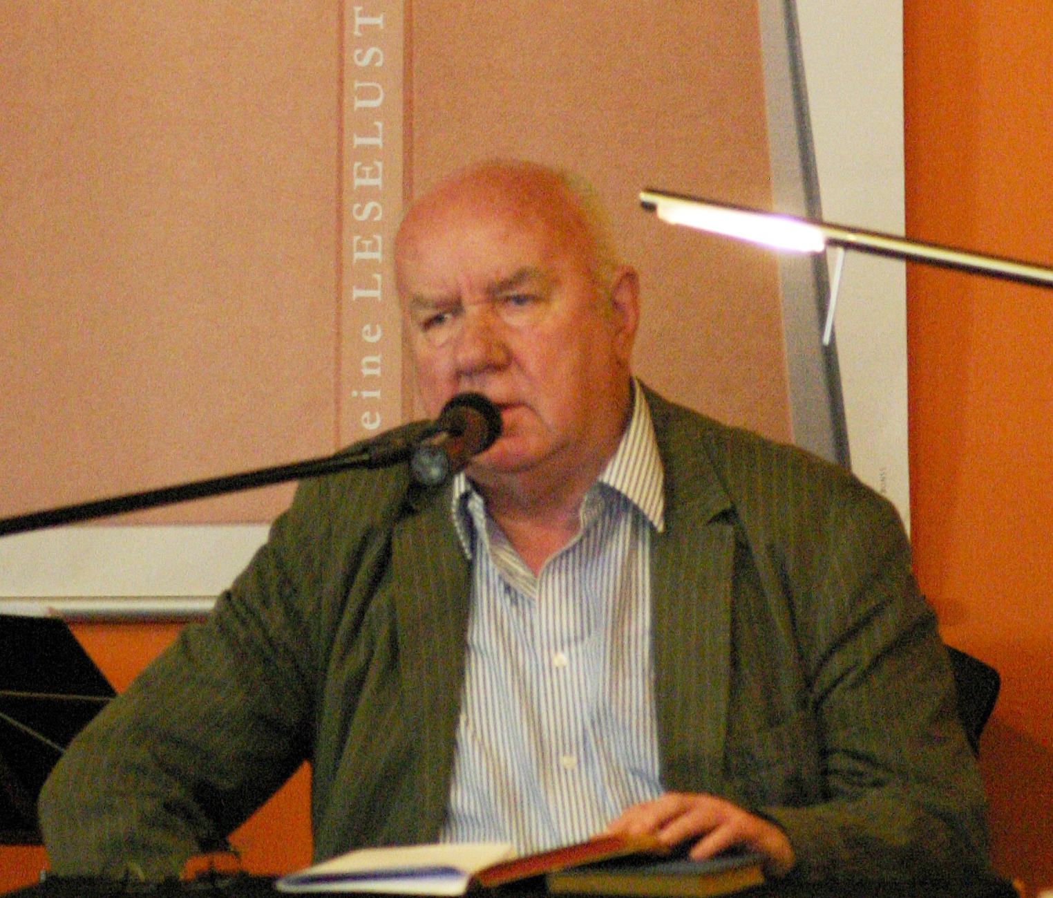 Klaus Walther, deutscher Schriftsteller, bei der Büchermeile der Leselust am 24.04.2010 im Tietz